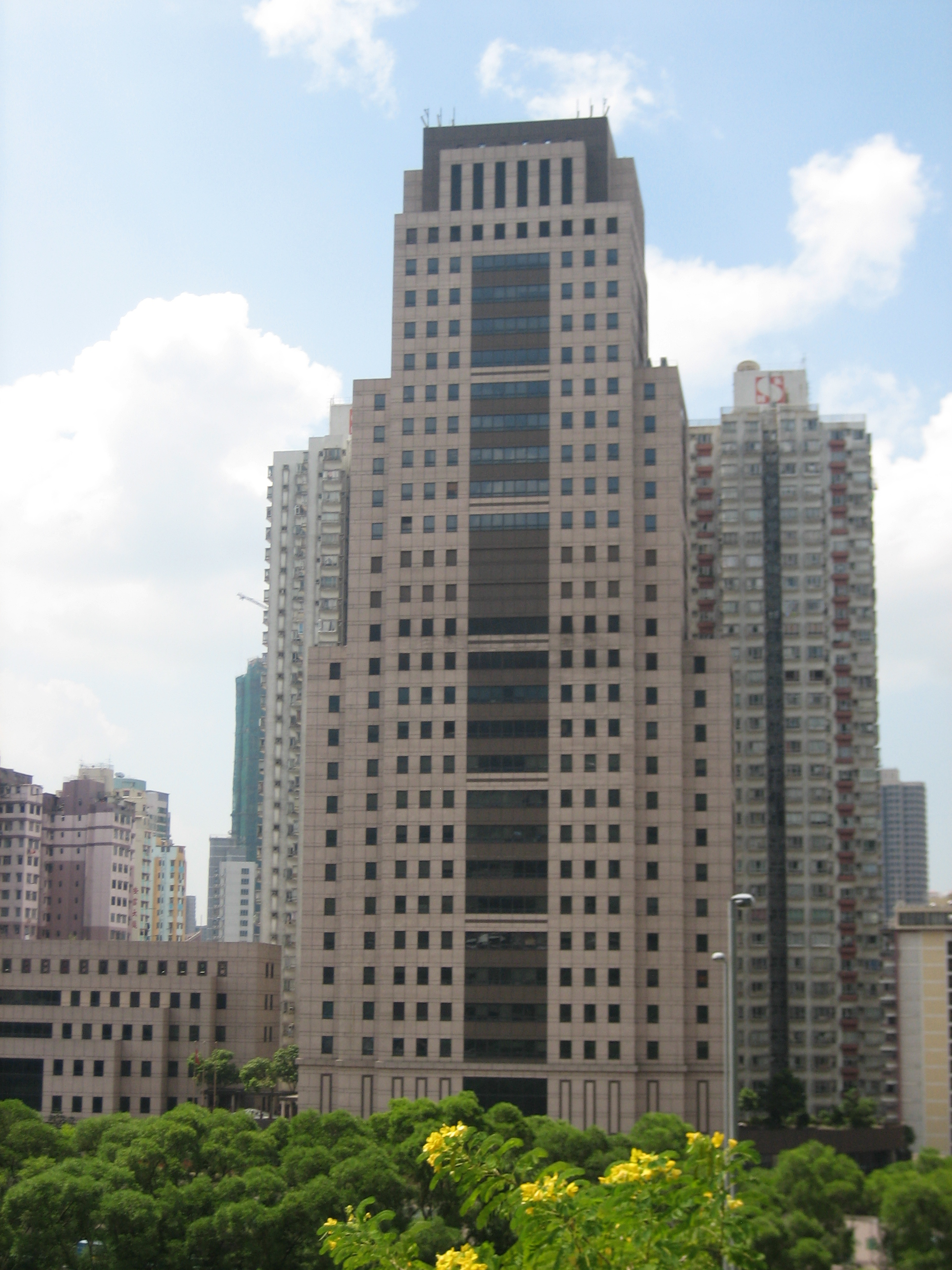 荃湾政府合署